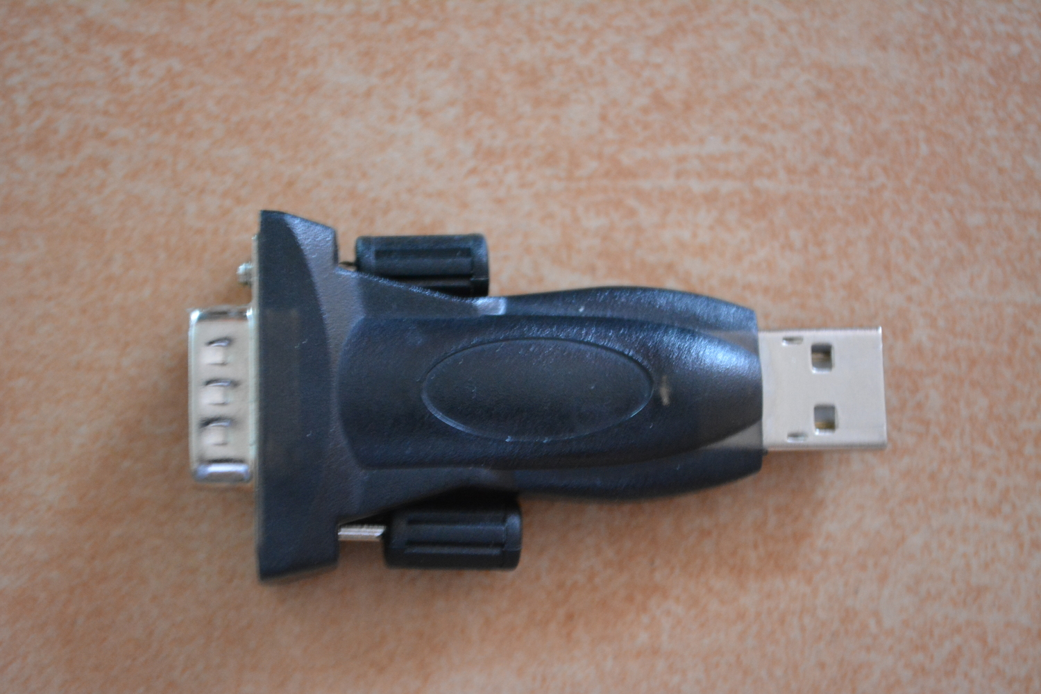 Redukce USB to Serial